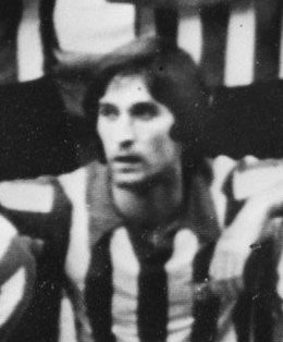 Collectie / Archief : Fotocollectie Anefo Reportage / Serie : Halve finale UEFA Cup RWD Molenbeek - Athletic de Bilbao (1977) Beschrijving : Elftalfoto Athletic de Bilbao (archief) Datum : 4 april 1977 Locatie : Bilbao, Spanje Trefwoorden : Europacup, UEFA Cup, voetbal Fotograaf : [onbekend] Auteursrechthebbende : Nationaal Archief Materiaalsoort : Negatief (zwart/wit) Nummer archiefinventaris : bekijk toegang 2.24.01.04 Bestanddeelnummer : 929-1073